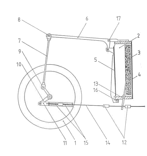 Skizze Bauteile Kolin Motor